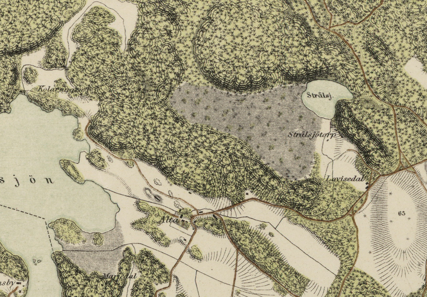 Trakten omkring Stockholm 1861 med Älta och Strålsjön